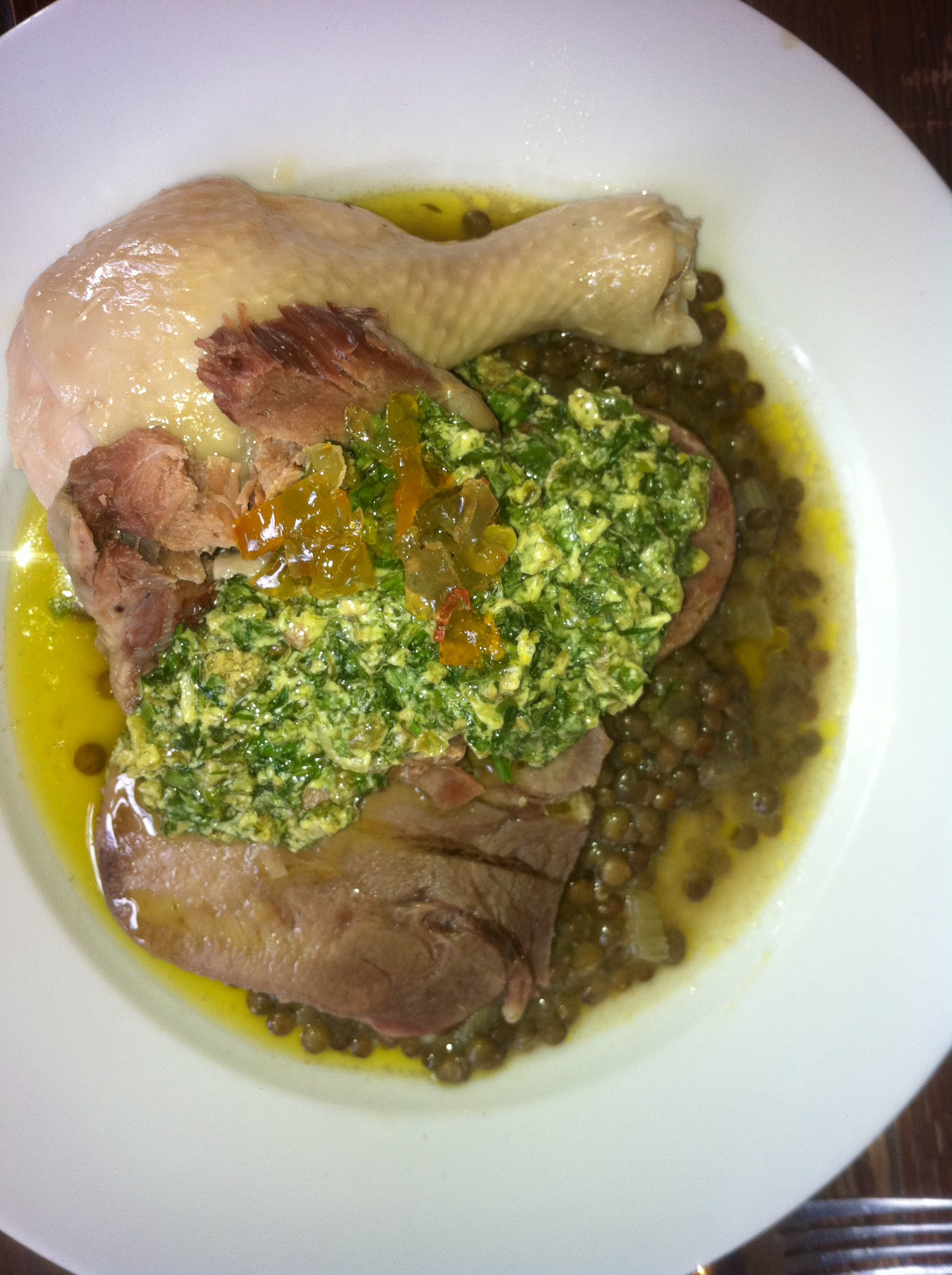 Bollito misto mit Salsa verde